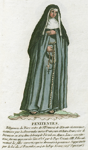 Collection de costumes de tous les ordres monastiques, supprimés à differentes époques, dans la ci-devant Belgique, Bruxelles, Philippe Joseph Maillart et sœur, 1811